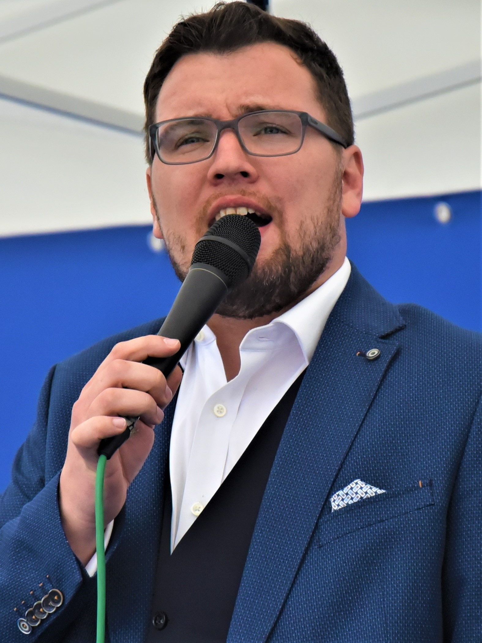 Petr Sovič, český swingový zpěvák